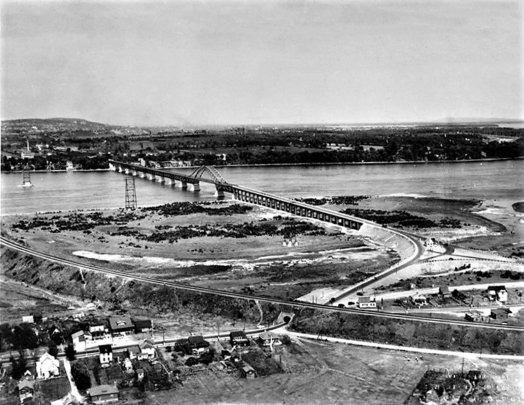 Le premier pont Honoré-Mercier avant son agrandissement.